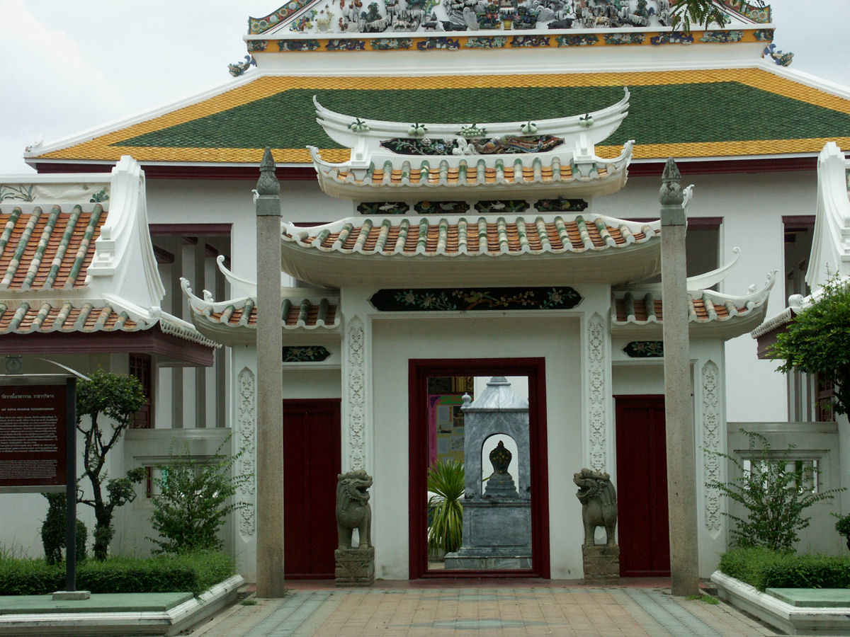 Wat Ratchaorotsaram (วัดราชโอรสาราม), Bangkok, Thailand